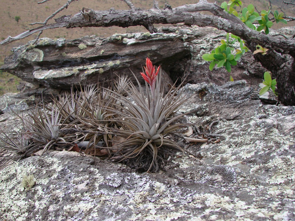 Tillandsia didisticha (E.Morren) Baker ( sin. het. Tillandsia crassifolia Baker) - BROMELIACEAE - Parque Estadual da Serra dos Pirineus - Pirenópolis - Goiás - Brasil.